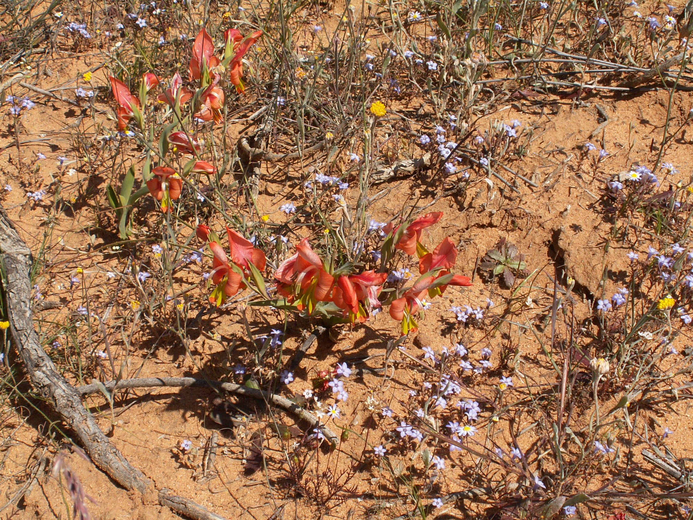 Siegwurz Gladiolus alatus L., Nahaufnahme, bei Clanwilliam, Südafrika